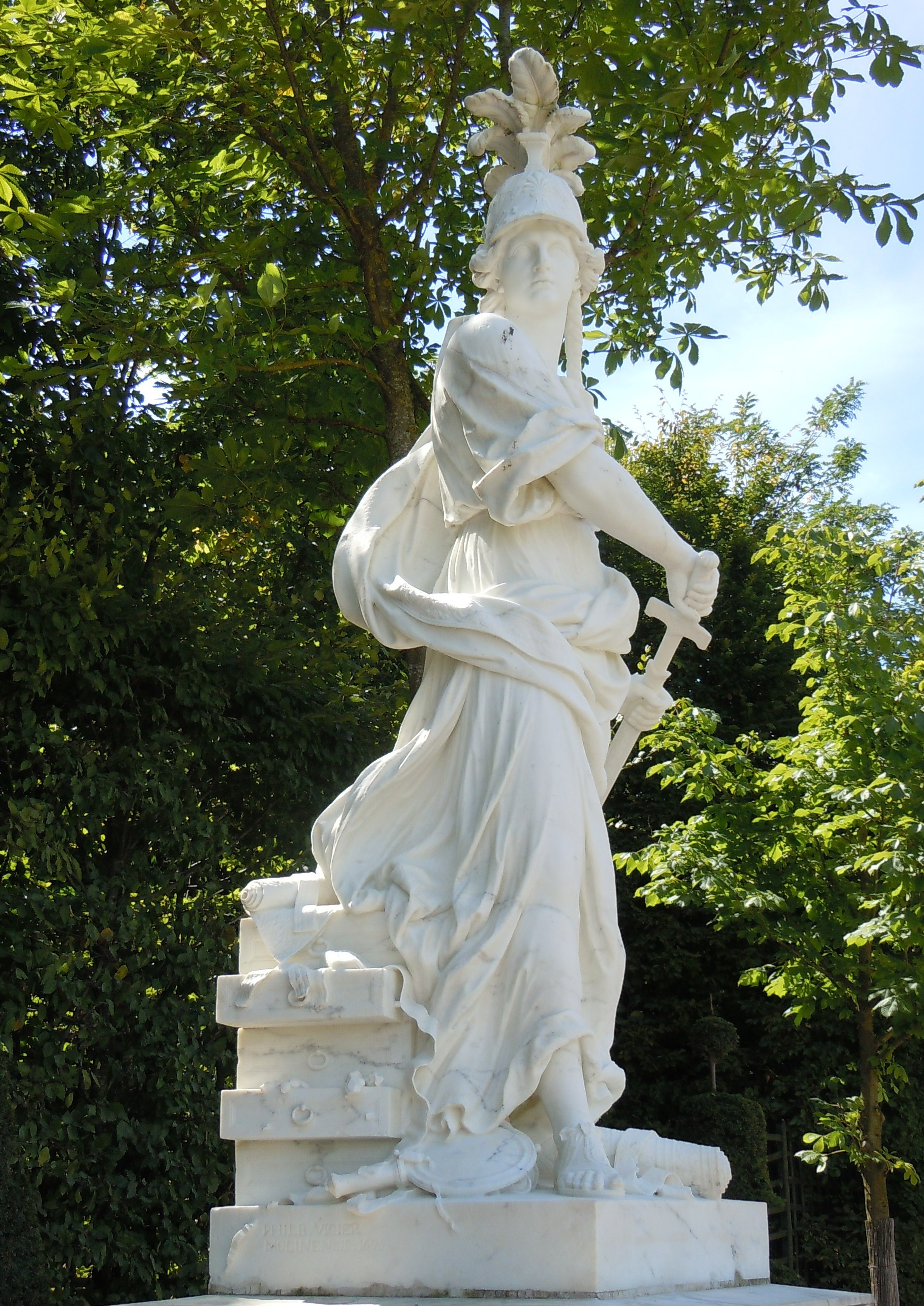 Statue d’Achille à Scyros (Philibert Vigier – 1695), Allée Royale - Parc du Château de Versailles